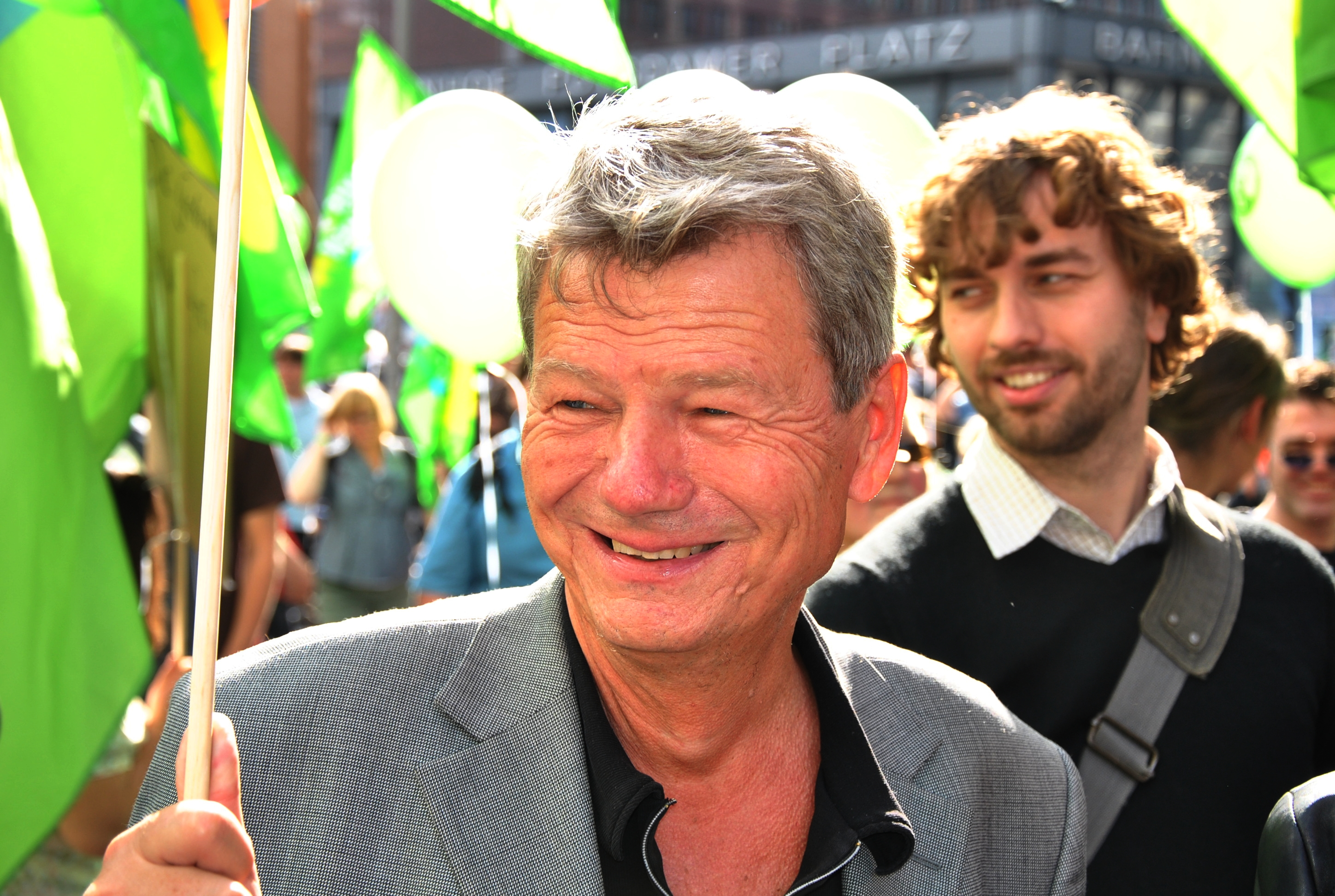 Wolfgang Wieland (in background: Stefan Gelbhaar)